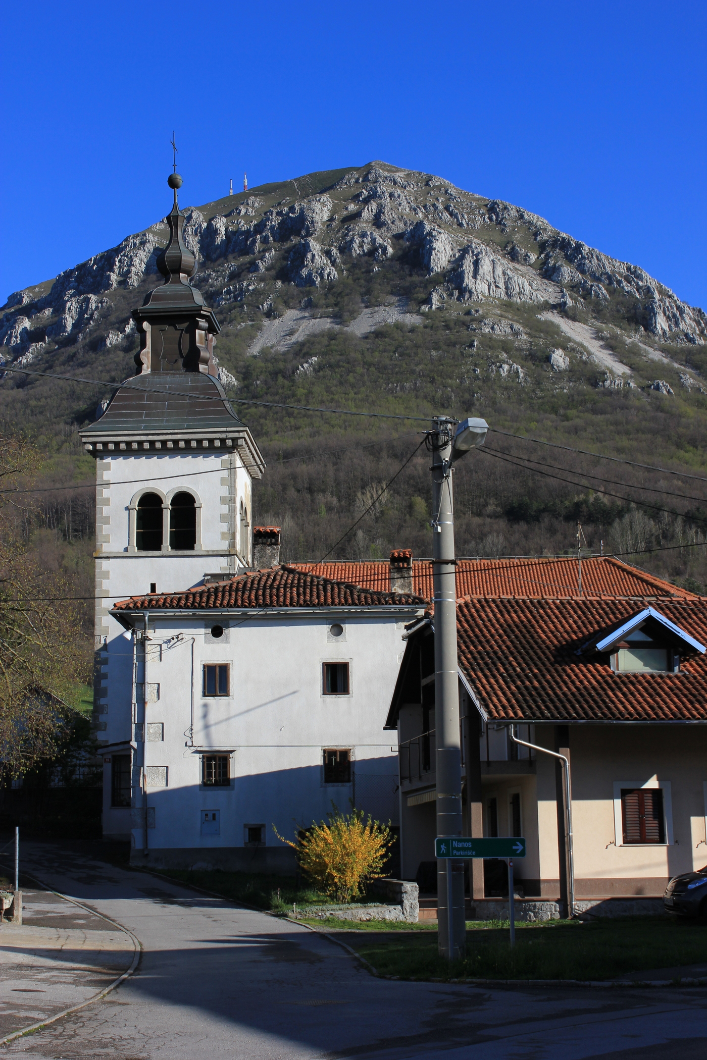 Die Kirche in Razdrto, Gemeinde Postojna, Slowenien. Im Hintergrund der Nanos.